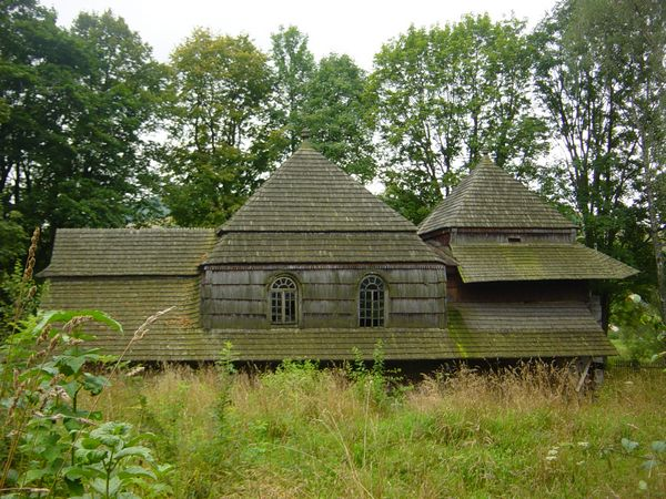 Liskowate - Cerkiew Narodzenia Najświętszej Panny Marii. Autor: wikipedysta:Frankee, 2005